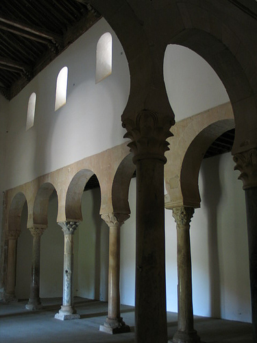 San Miguel de Escalada: interior.